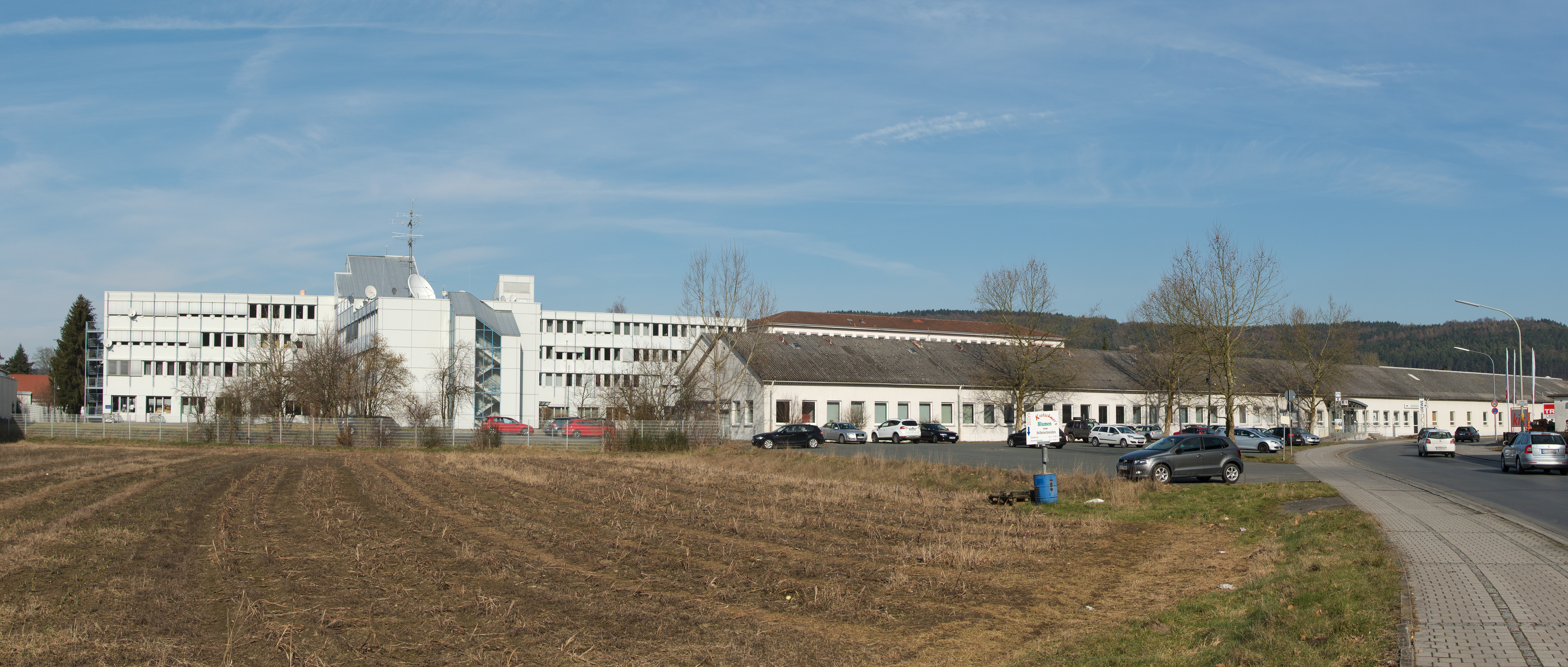 Das Werk des Unterhaltungselektronik-Herstellers Loewe in Kronach.